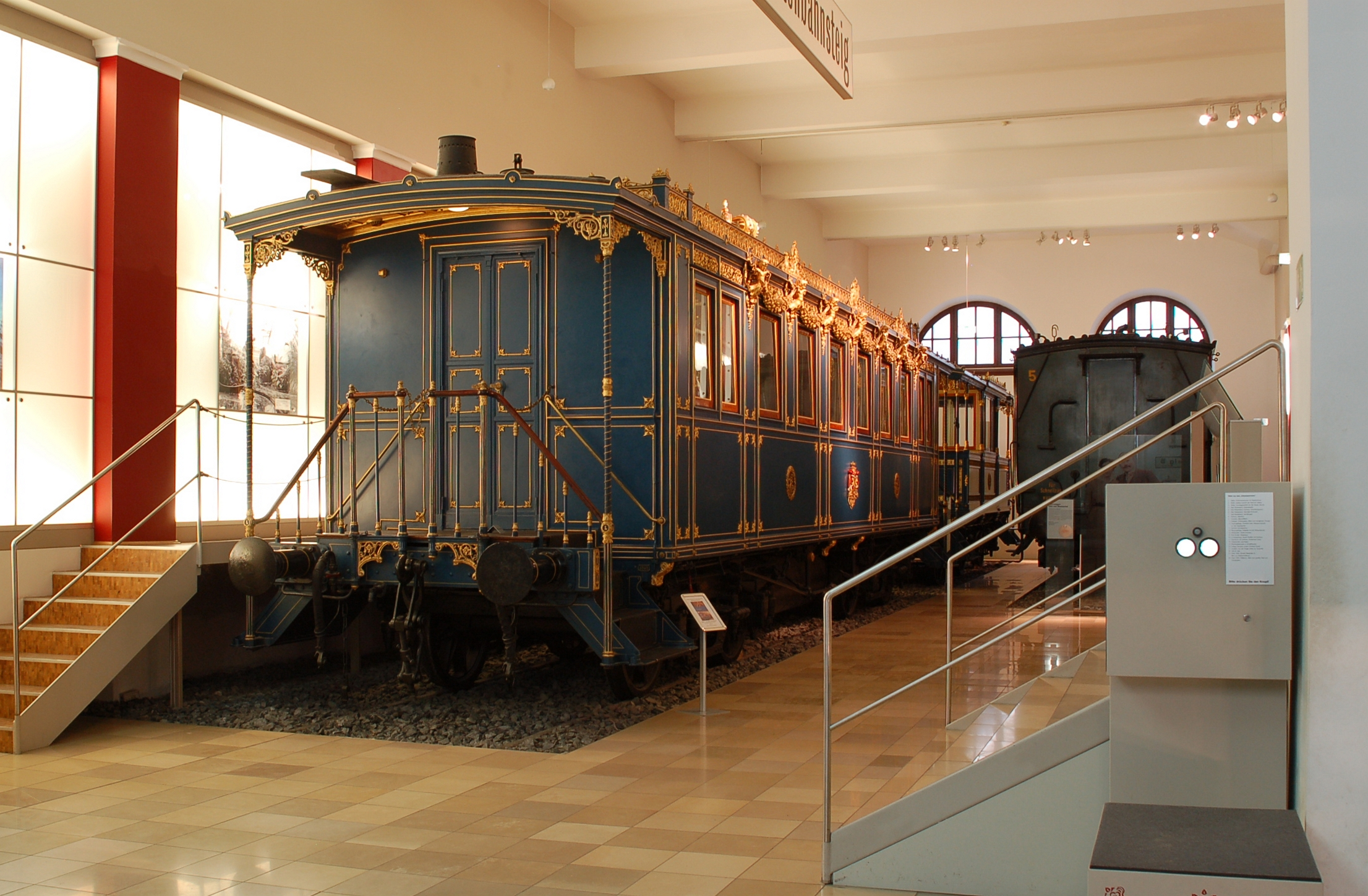 Hofzugwagen König Ludwig des Zweiten von Bayern im Verkehrsmuseum Nürnberg